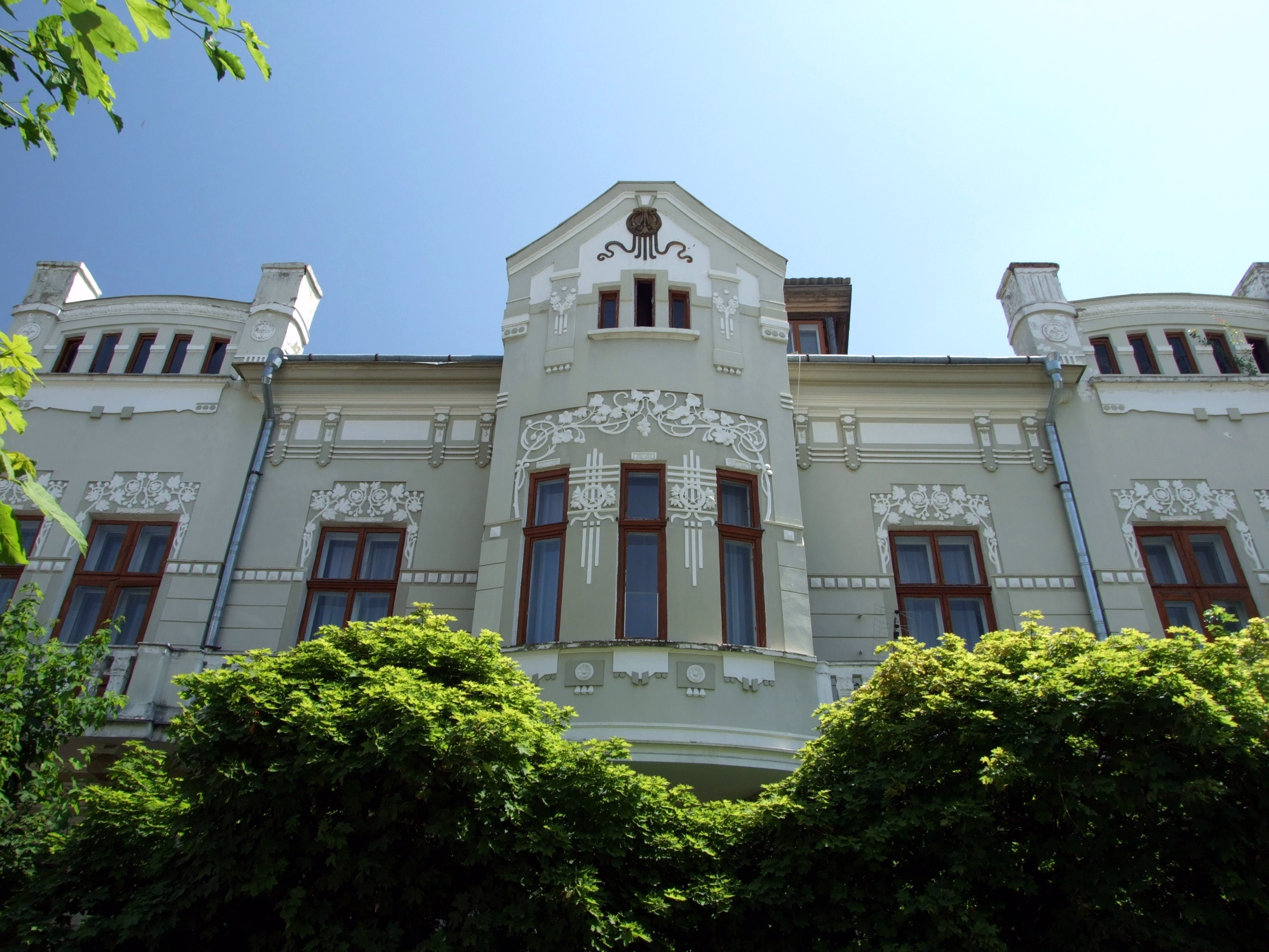 Житловий будинок, поч. ХХ ст.